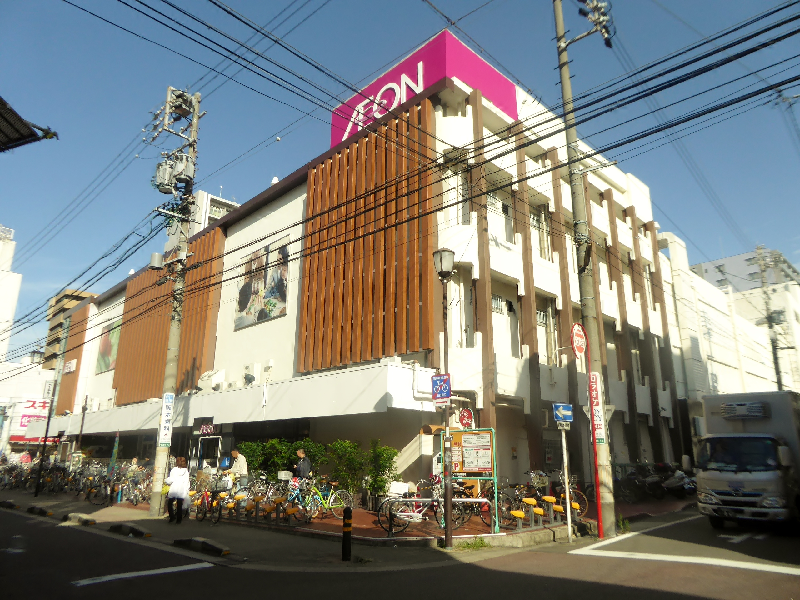 イオン（旧・ダイエー）今池店を撮影。